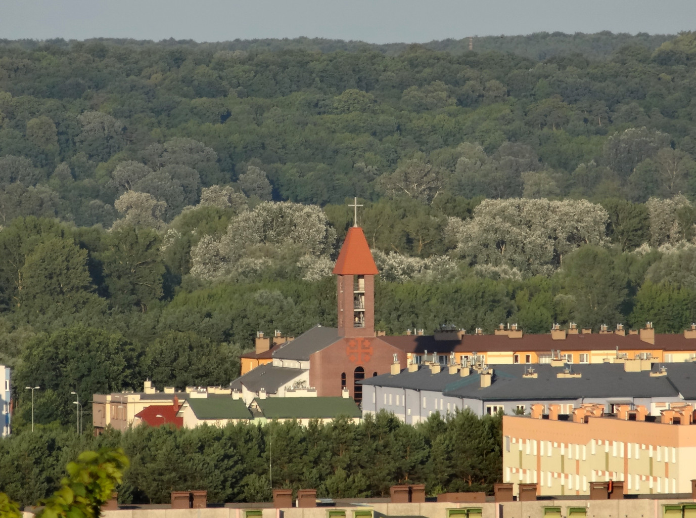 Kościół p.w. św. Łukasza Ewangelisty w Bydgoszczy-Fordonie - widok ze Zbocza Fordońskiego